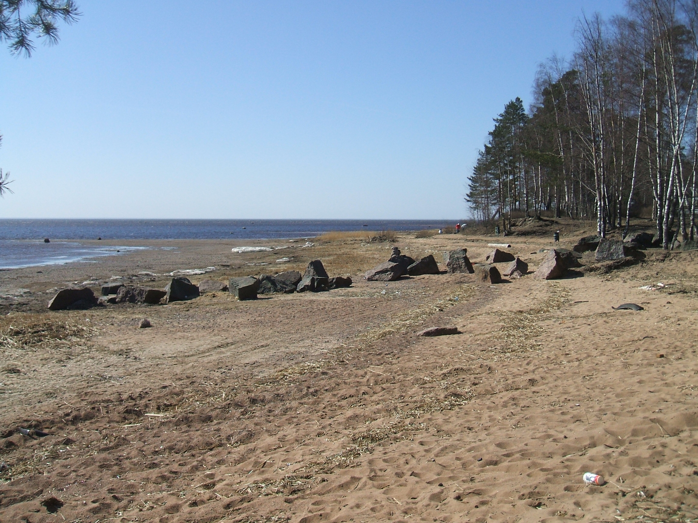 Фотографии вдоль границ муниципальных образований